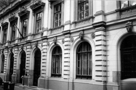 Régi képviselőház. A dualizmus korában (az Országház) felépültéig ebben az épületben ülésezett az országgyűlés (Budapest, VIII. kerület, Bródy Sándor u. 8.)